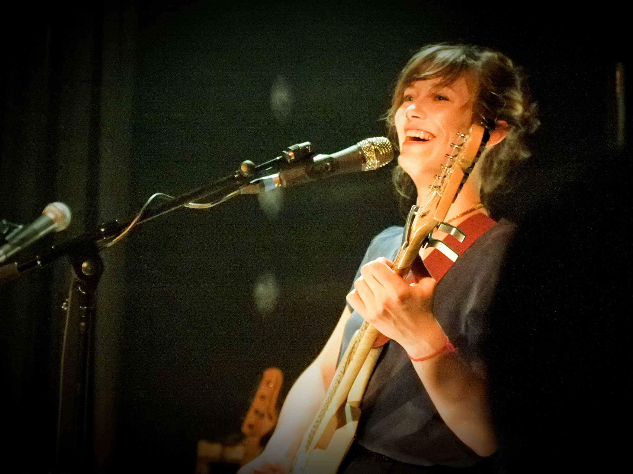 Mina Tindle en concert à La Maroquinerie, Paris le 12 mars 2012.